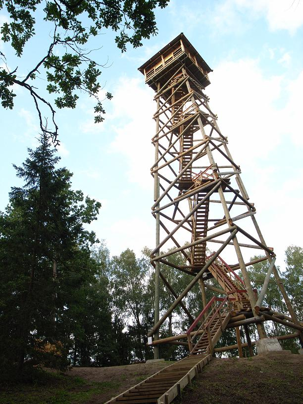 Kamparkalna skatutornis